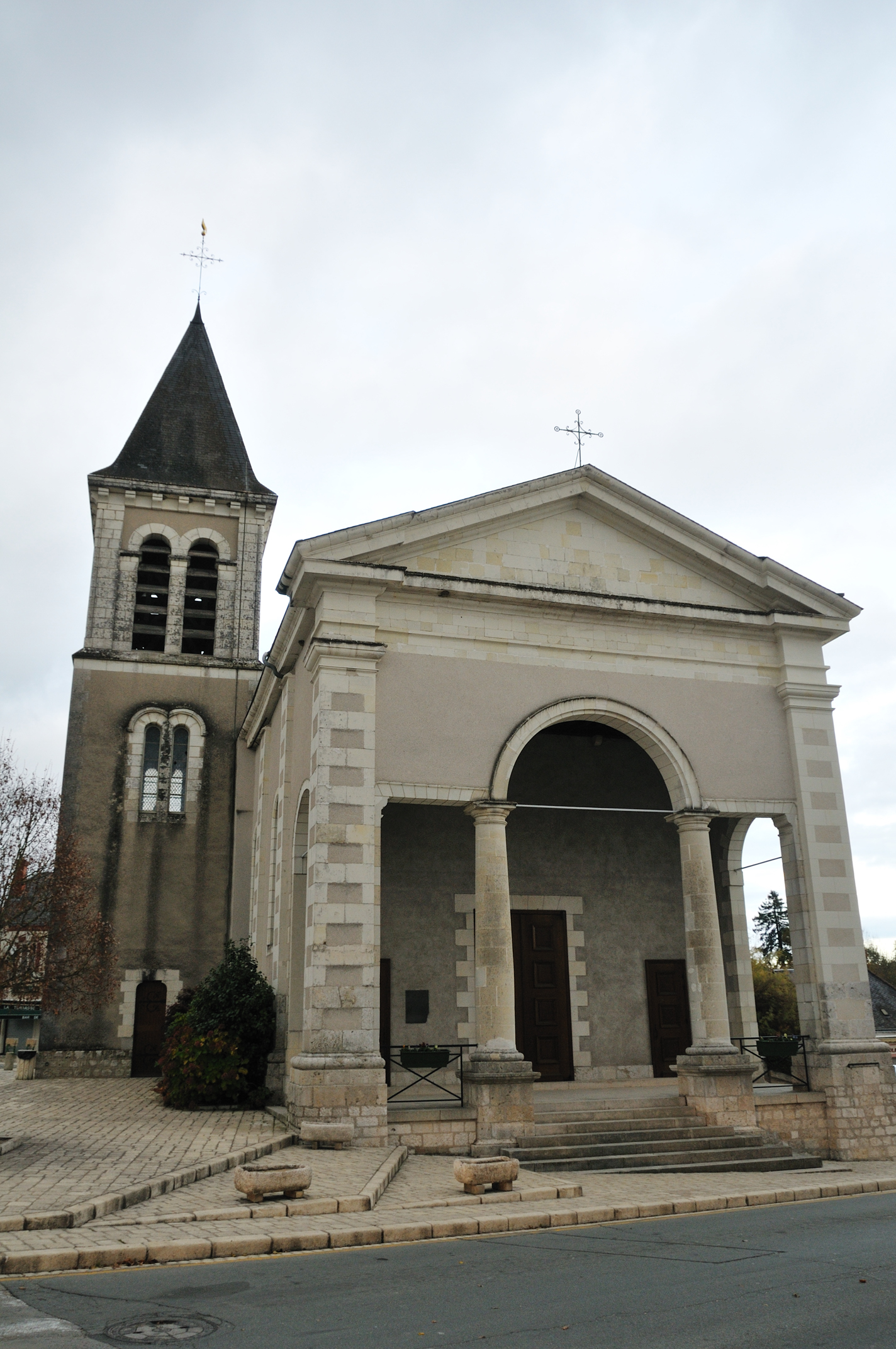 Église Saint-Denis, Neung-sur-Beuvron, Loir-et-Cher, France